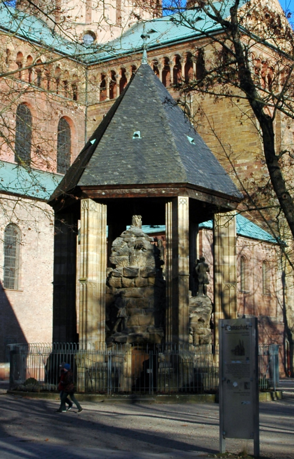 Ölberg bei Speyerer Dom